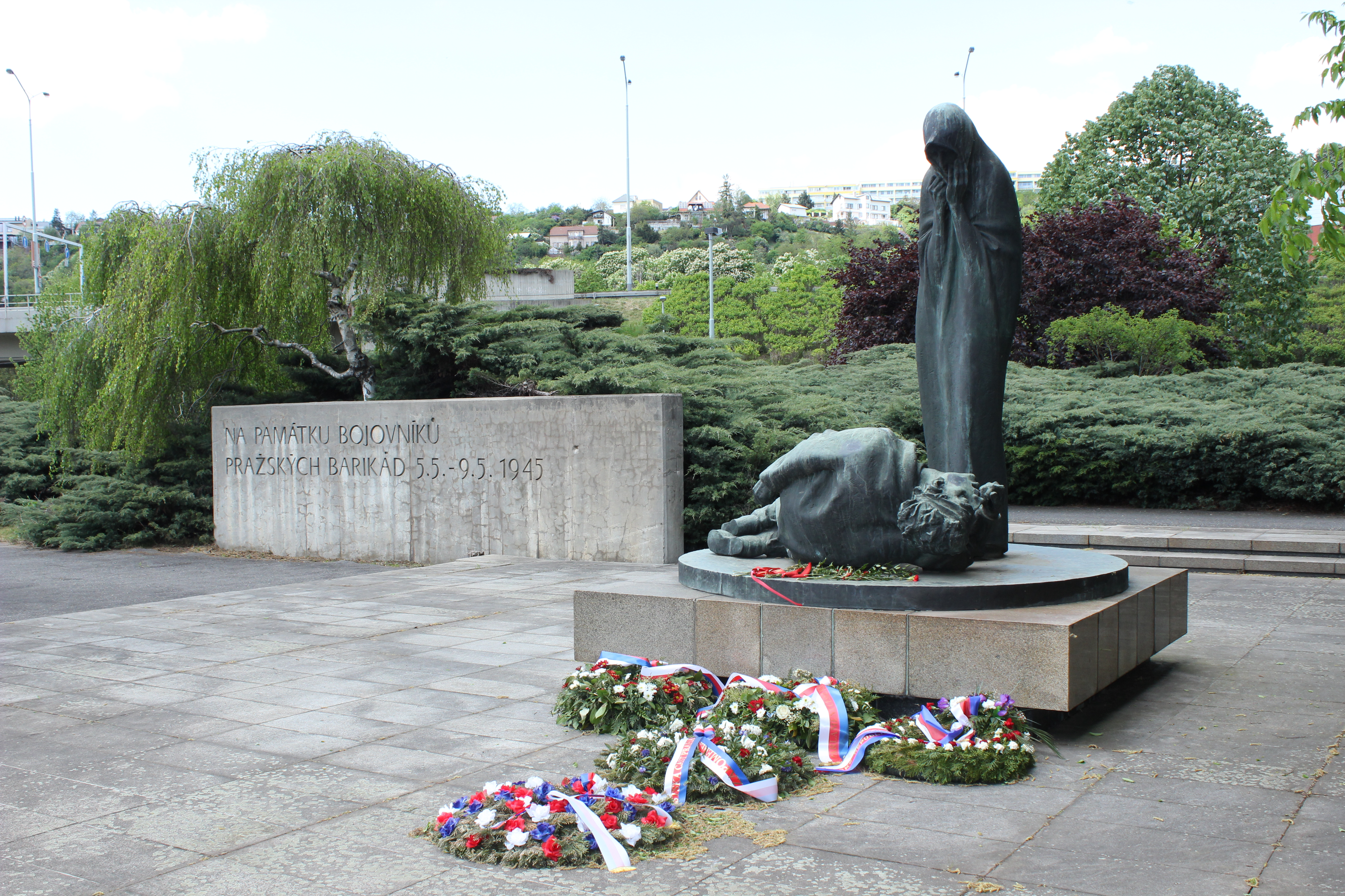 Socha padlého barikádníka v předpolí pražského mostu Barikádníků.